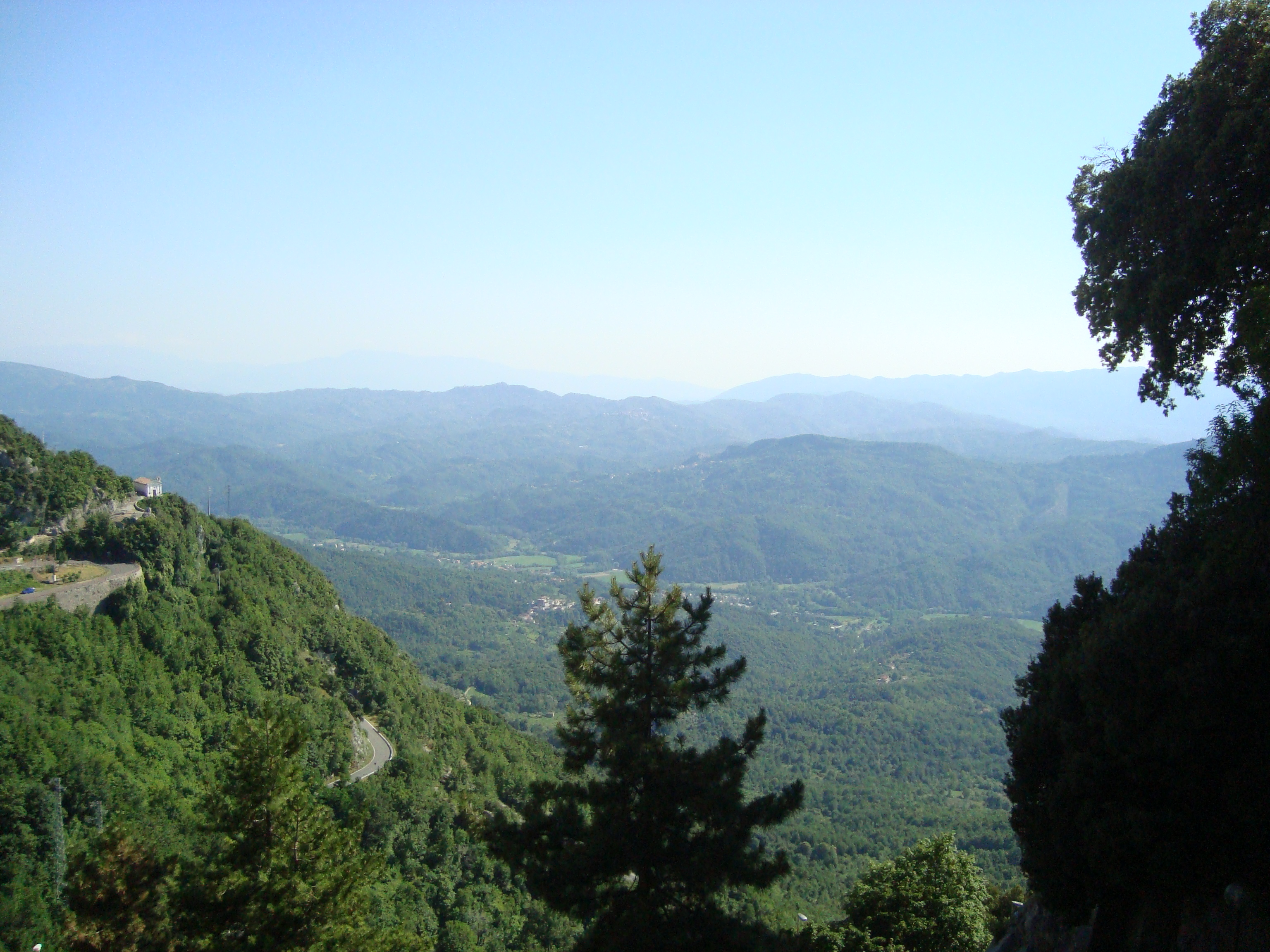 Vue des monts Ruffiens (Monti Ruffi) dans les Appenins en Italie depuis Cervara di Roma